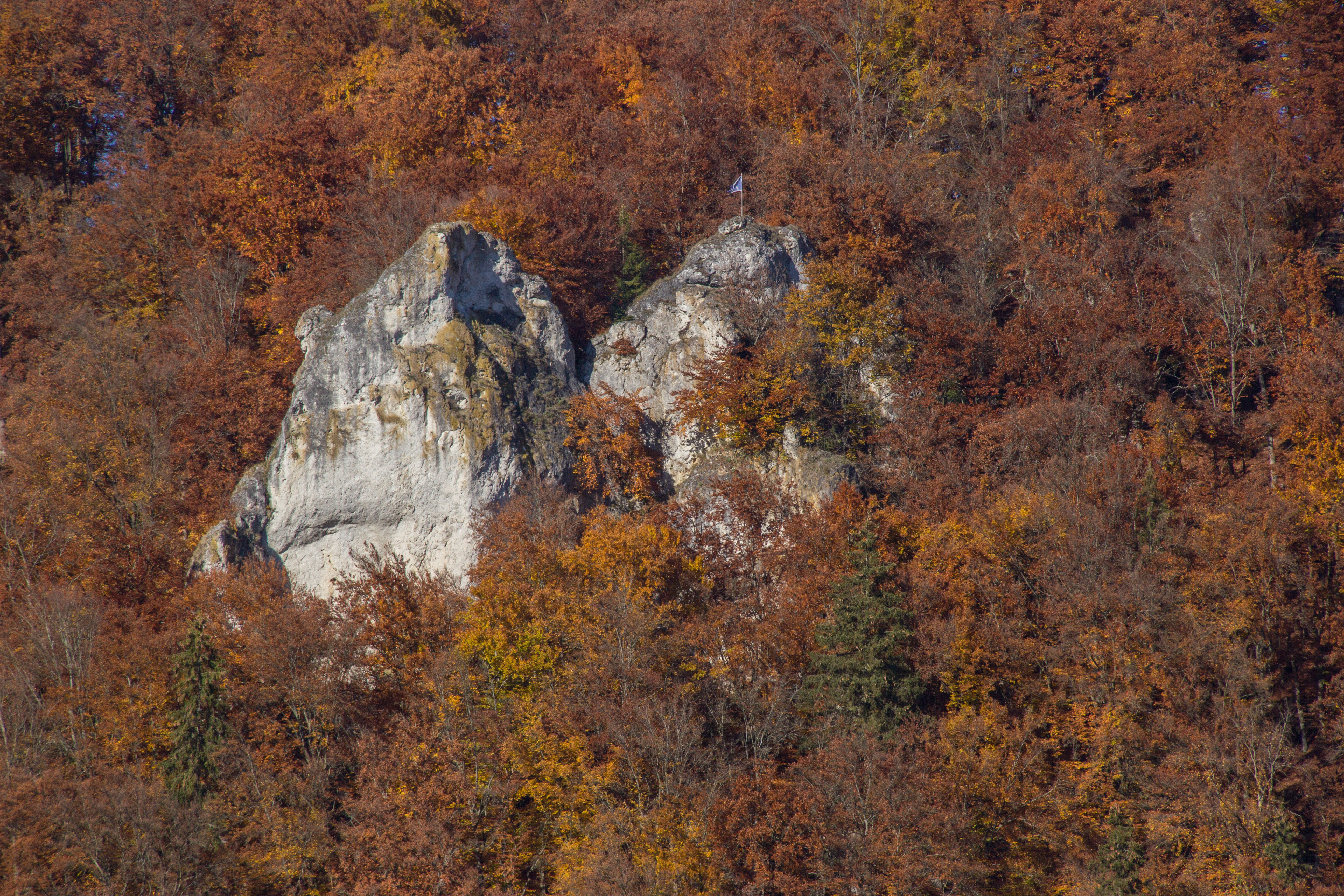 Felsgruppe in der Groppenhofener Leite von Ried, Dollnstein, Geotop